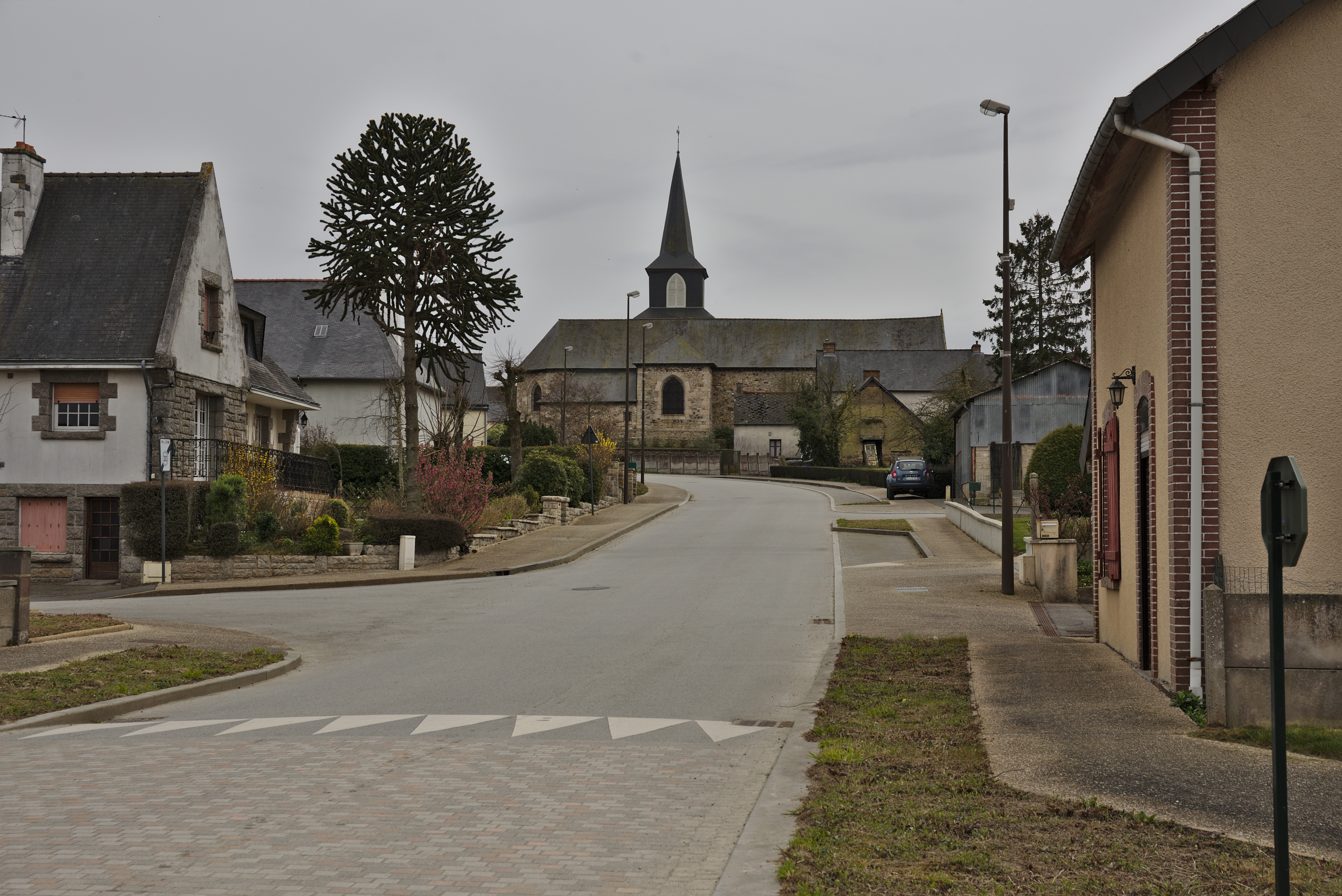 Bourc'h Tremorae.